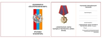 «Հասարակական կարգի գերազանց պահպանման համար» մեդալի վկայական